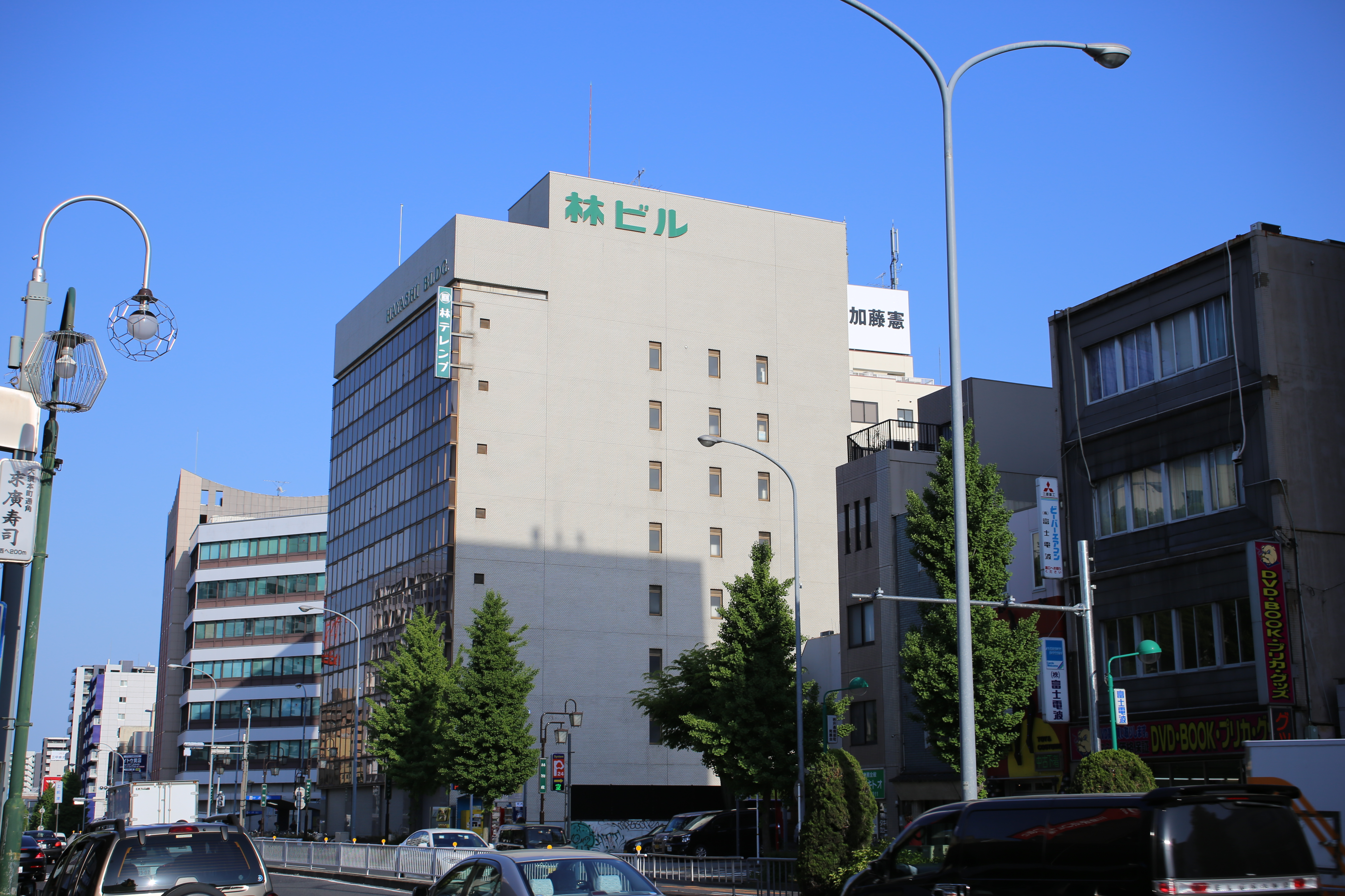 名古屋市中区上前津一丁目の林テレンプ本社を北側公道西側より撮影